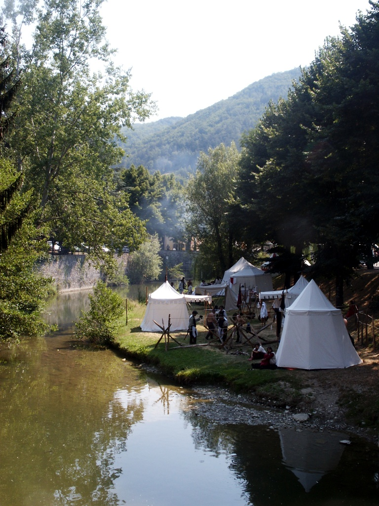 Palazzuolo sul Senio, Toscana, Italia